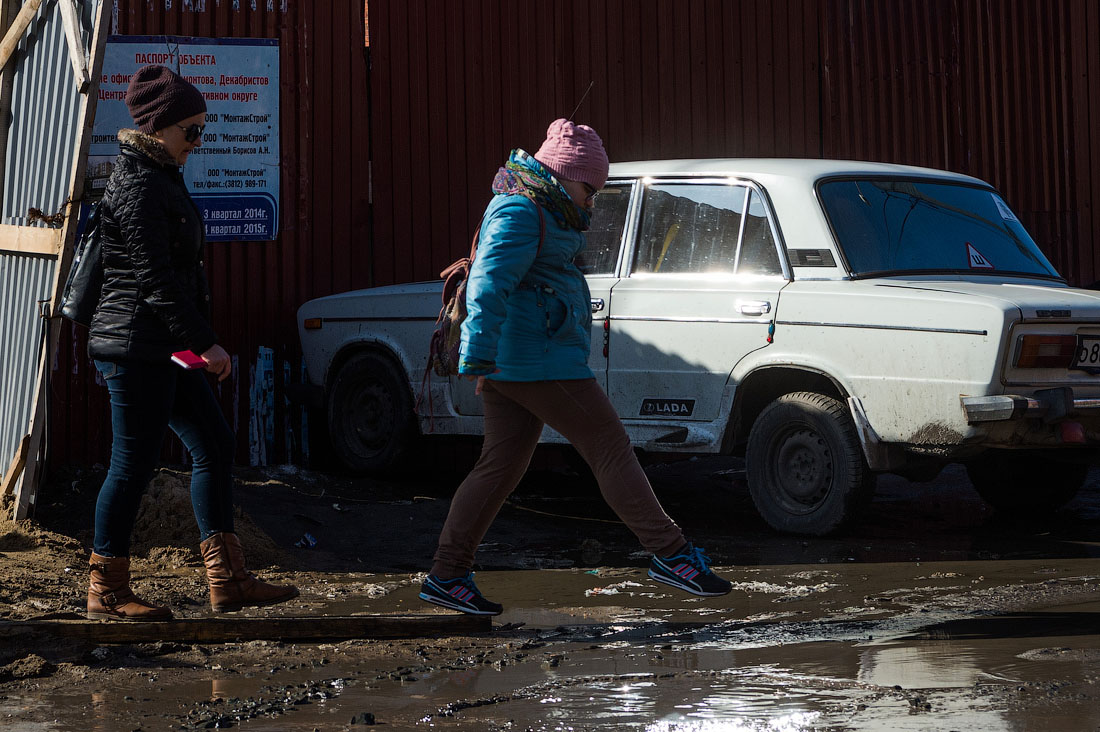 Фотография двора в городе Омск